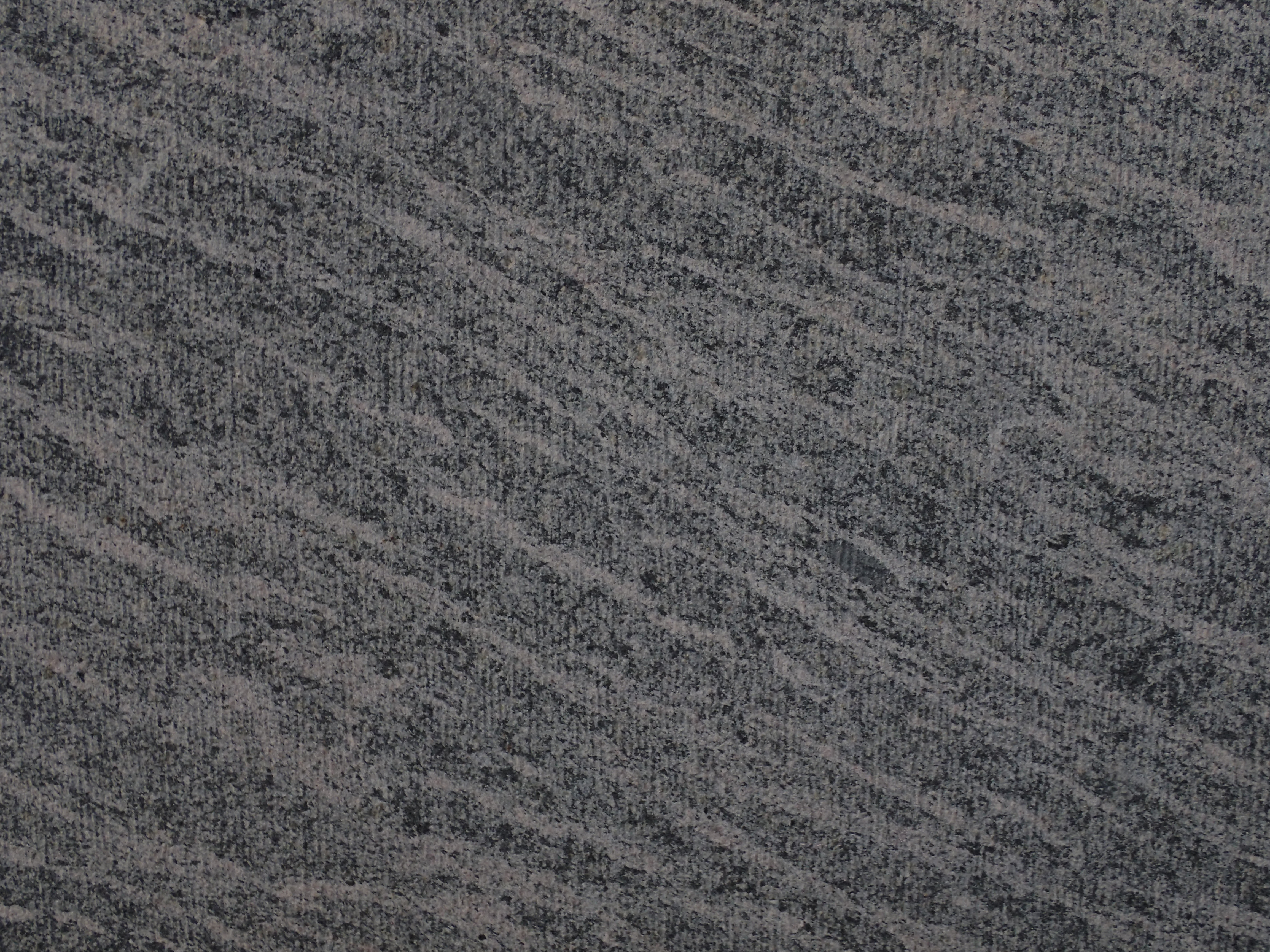 Facadesten af Paradisbakke-migmatit, Forsvarsministeriet, Ved Stranden 2, København (udsnit ca. 50x40 cm)